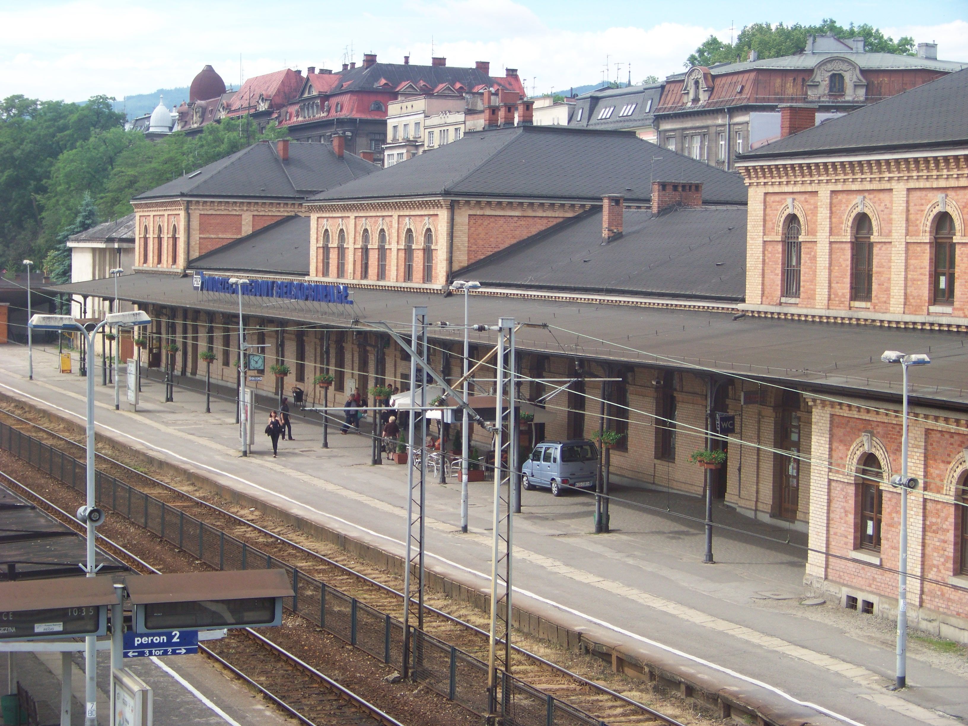 Dworzec kolejowy w Bielsku-Białej